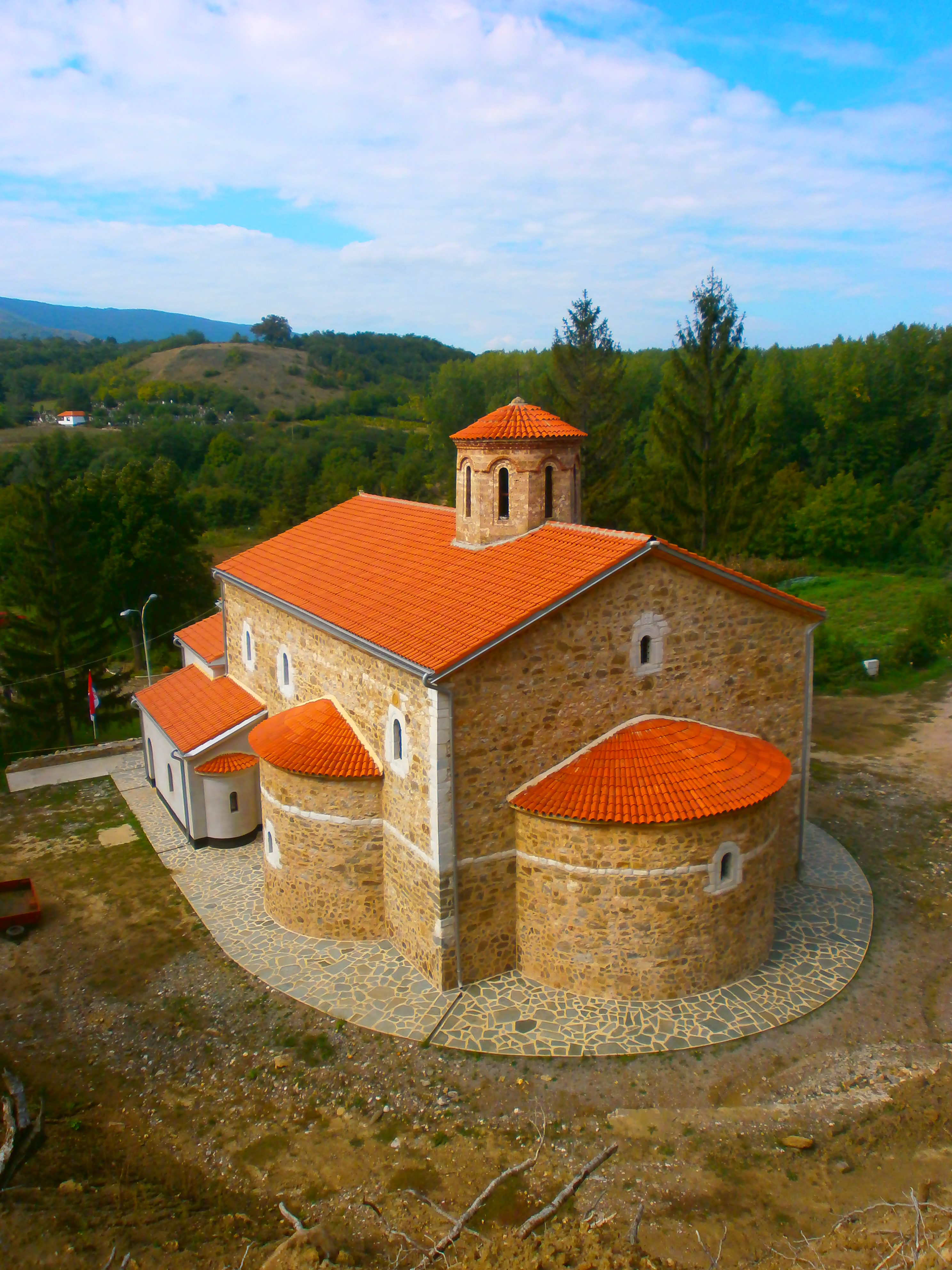 Srpski (latinica): Manastir Sukovo, Pirot